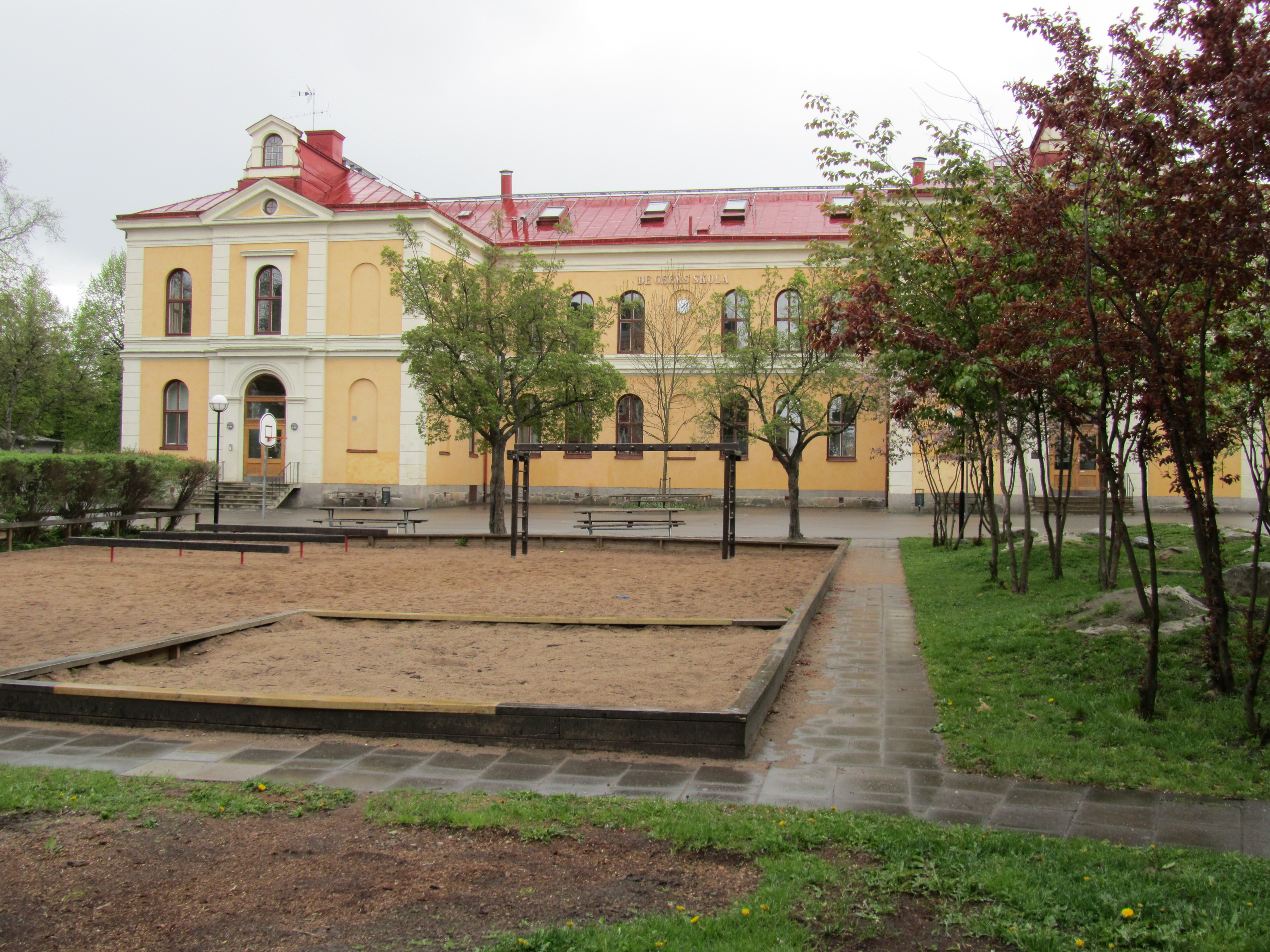 Gamla De Geerskolan in Norrköping